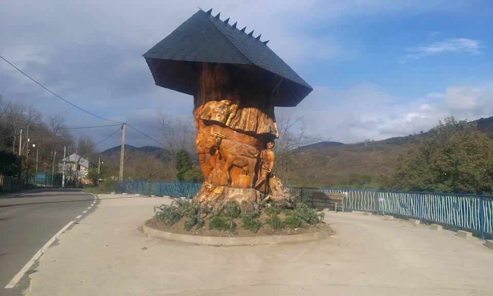 Vista de la plaza del barrio de la Eras.